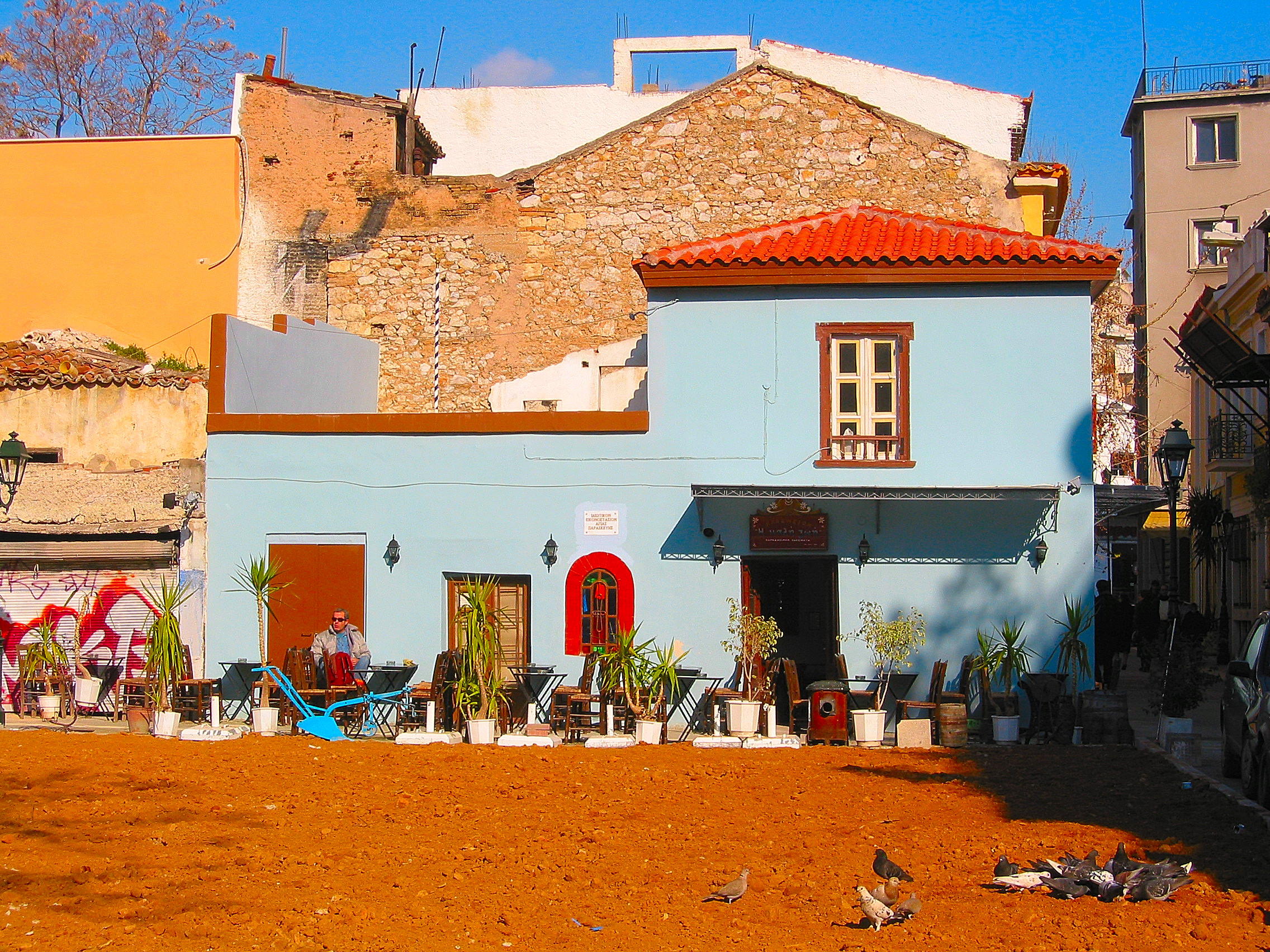 Athènes, photo insolite de Plaka. Photo prise par Harrieta171 le 21/01/06